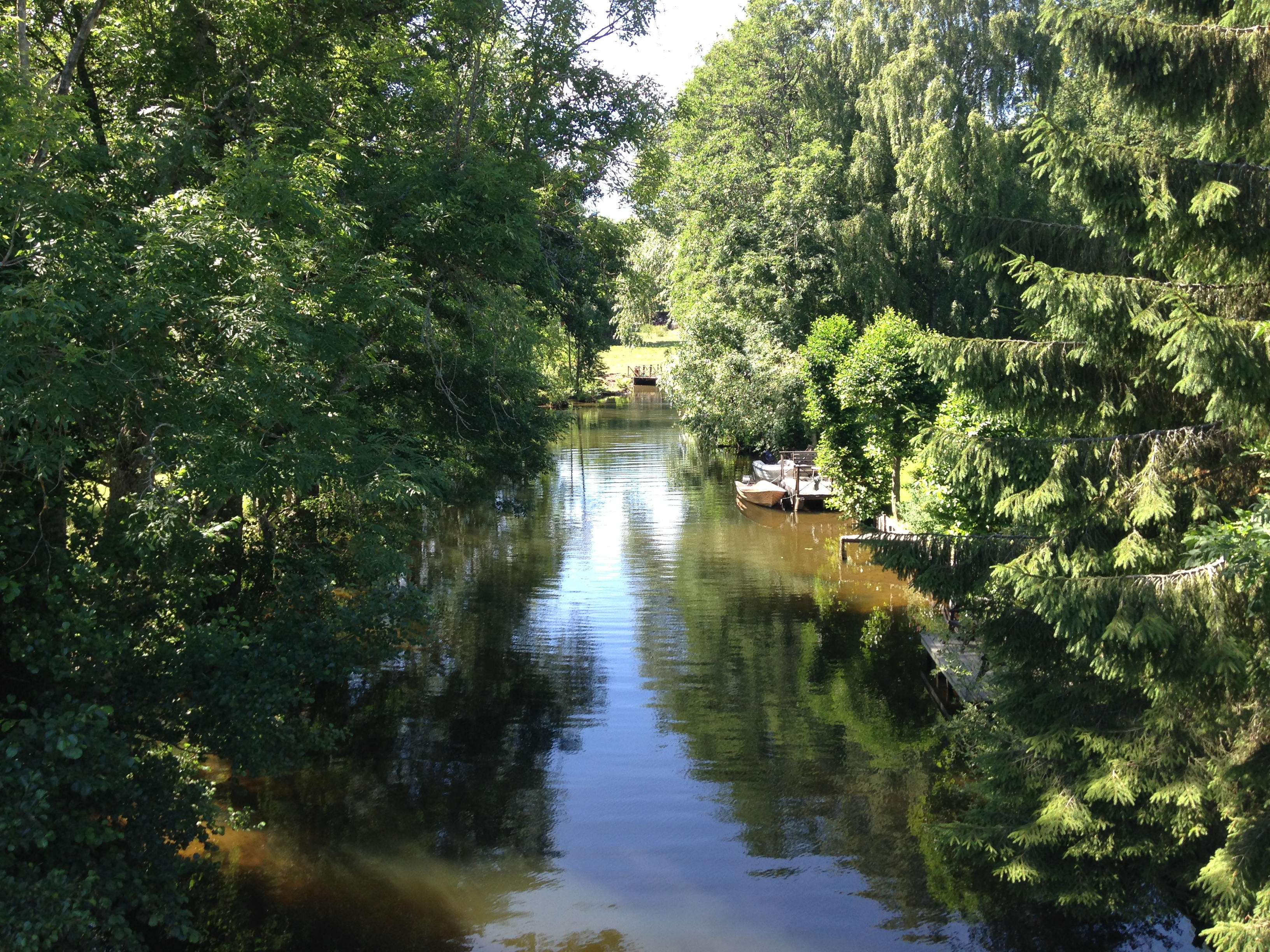 Skedevid kanal mellan Ämmern och Åsunden